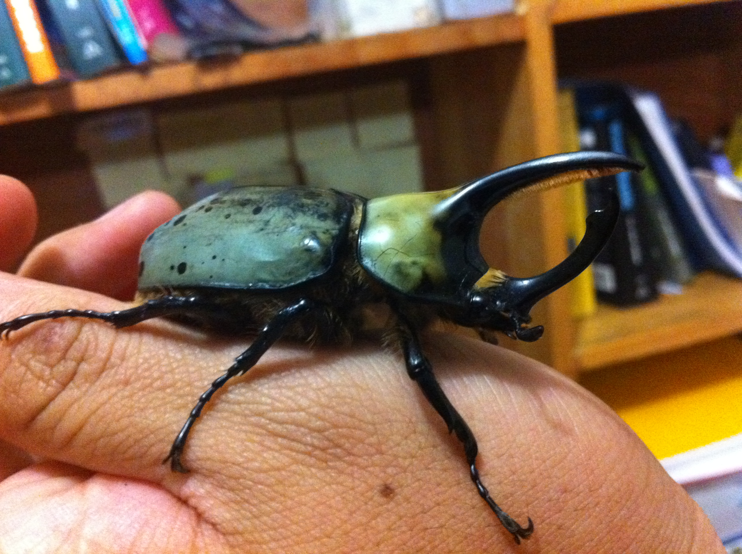 Escarabajo - Beetle